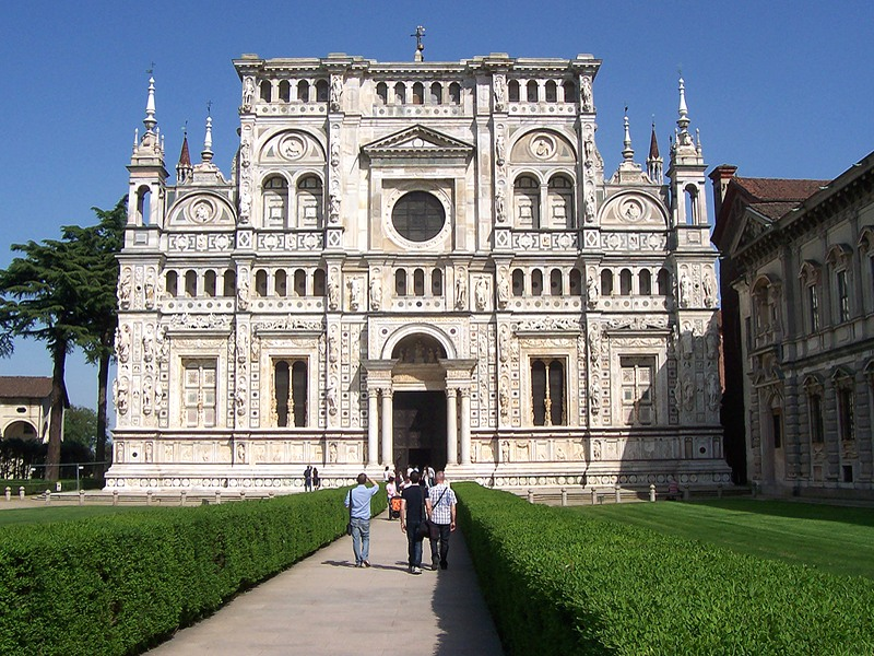 Certosa di Pavia - Chiesa della Certosa